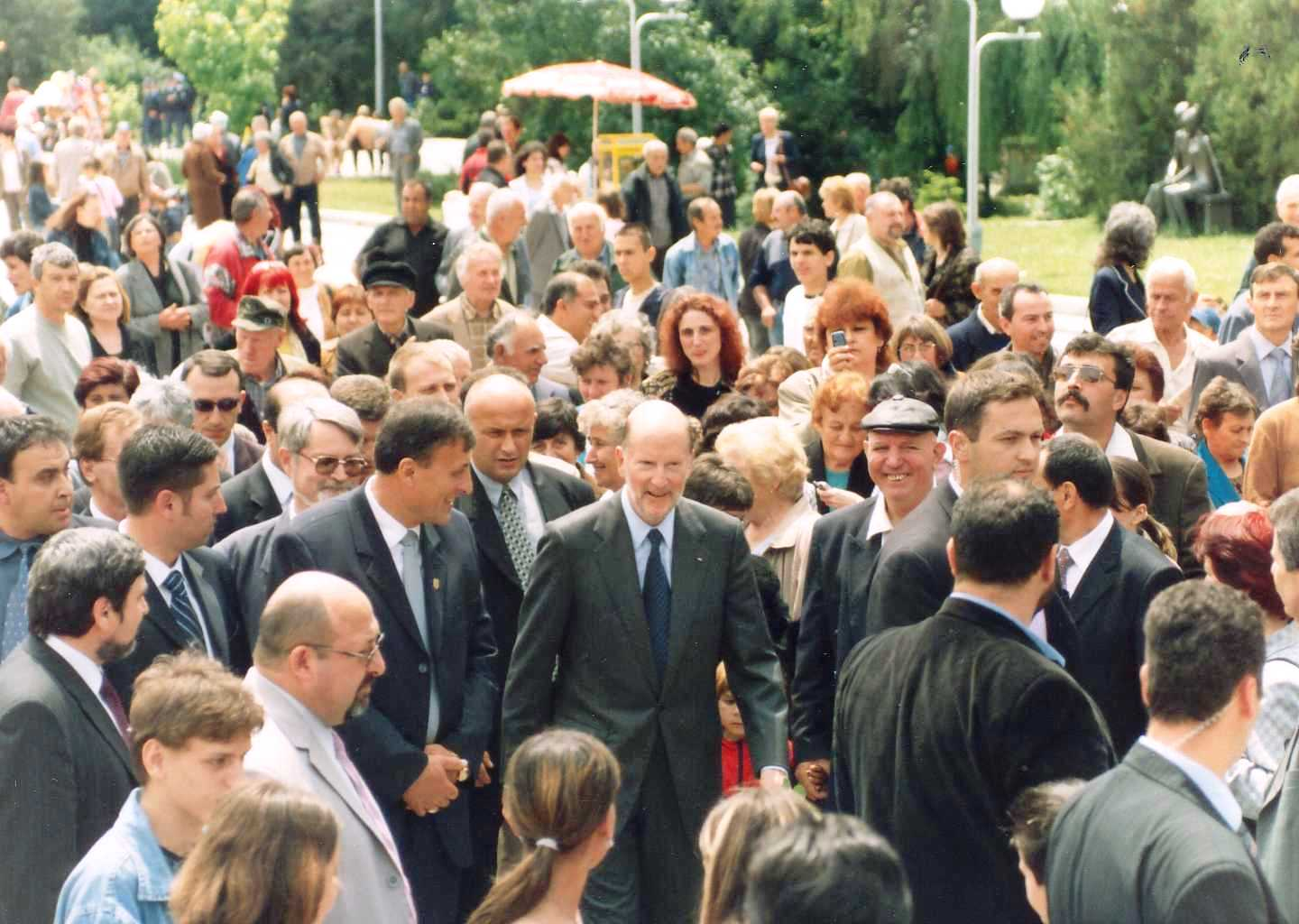 Министър-председателят Симеон Сакс-Кобург-Готски на посещение в Попово за откриването на реконструирания и обновения мост при централния градски площад